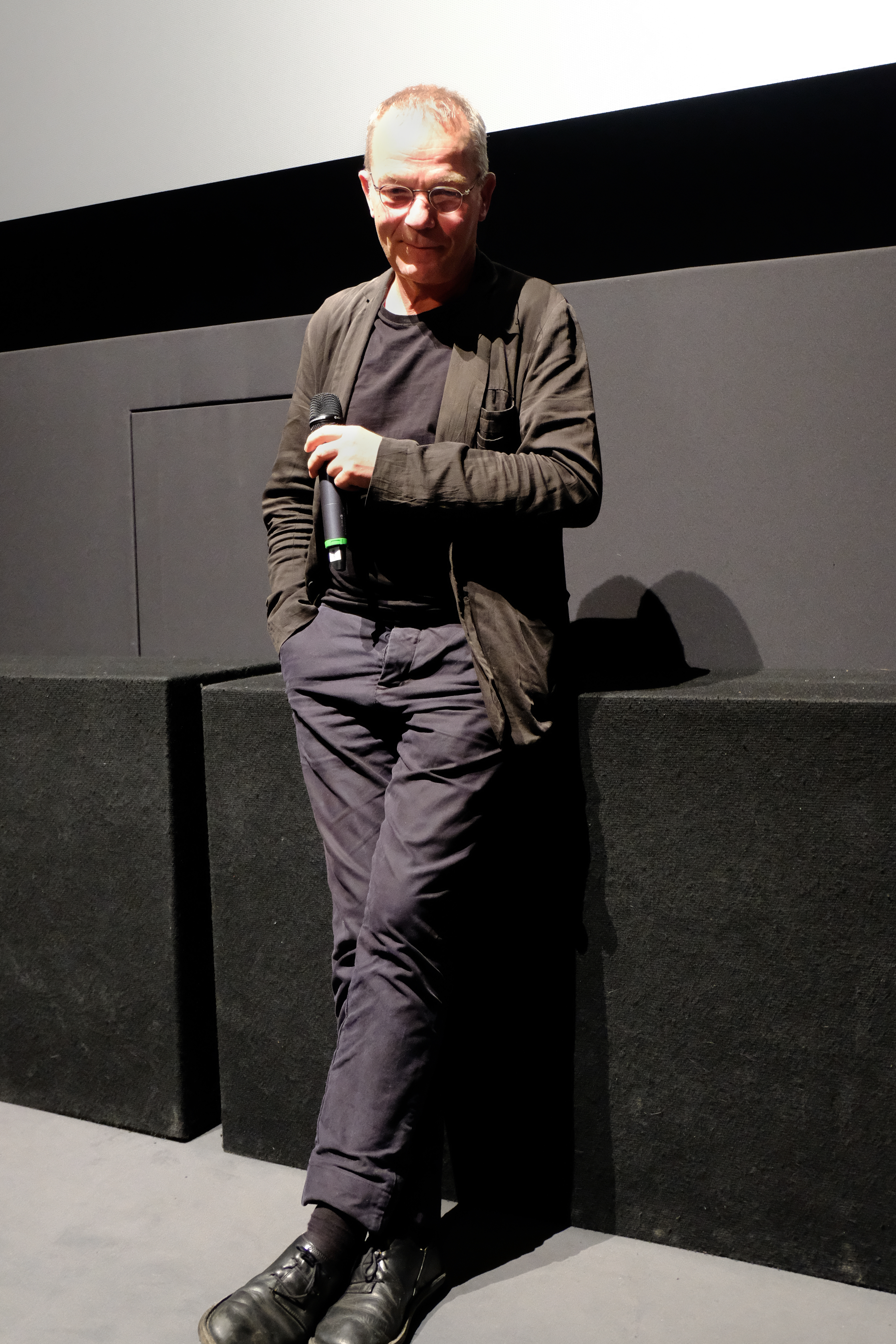 Der Regisseur Thomas Heise im Mai 2019 im Münchner Filmmuseum. Anlass ist die Präsentation seines Films „Heimat ist ein Raum aus Zeit" im Rahmen der „Underdox Halbzeit"